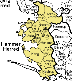 Hammer Herred Præstø Amt , Denmark. Map by Svend-Erik Christiansen, edited by user:Nico-dk .